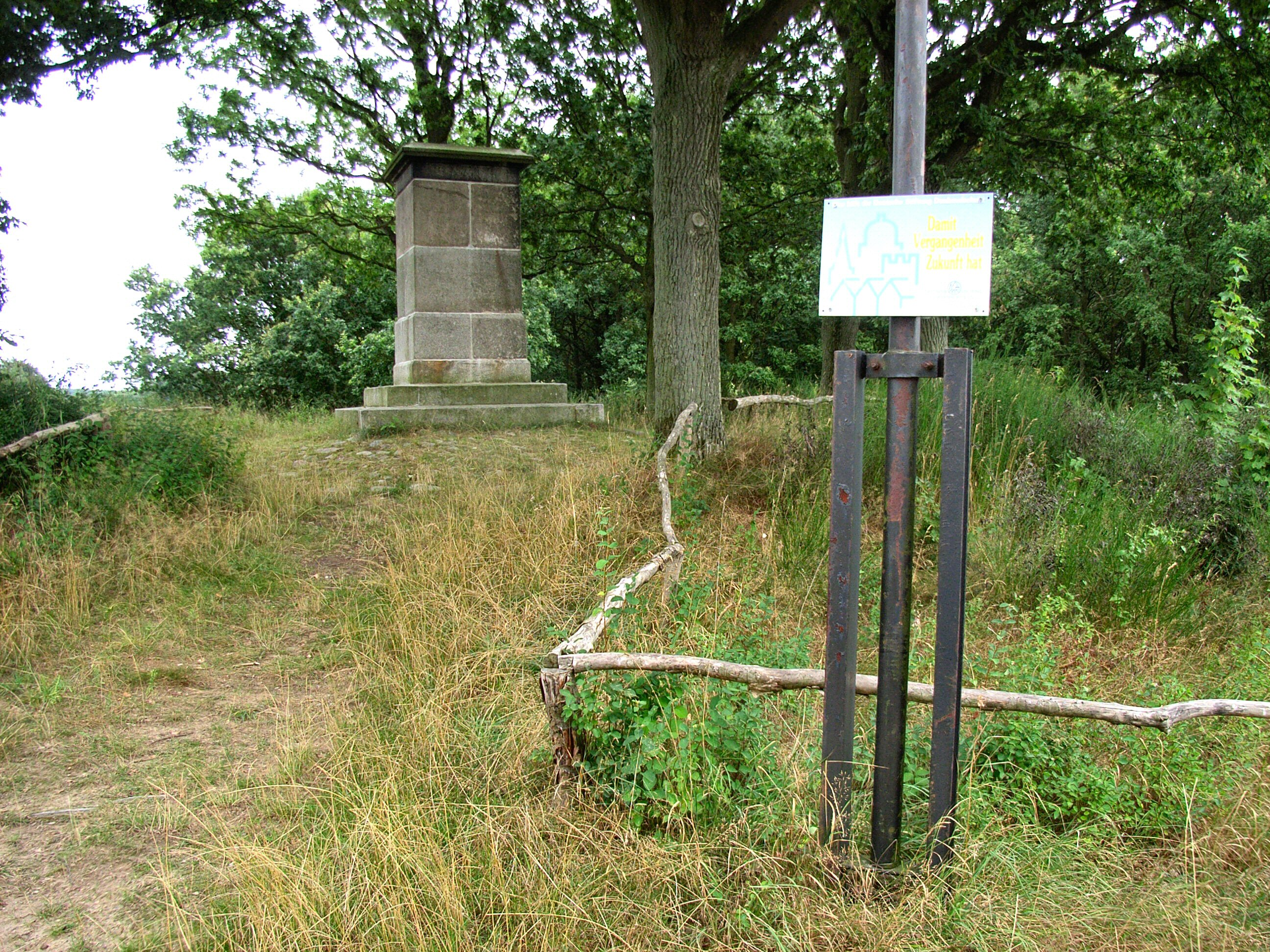 Postament der Preußensäule von 1855 bei Groß Stresow auf der Insel Rügen - im Oktober 2004 wiedererrichtet